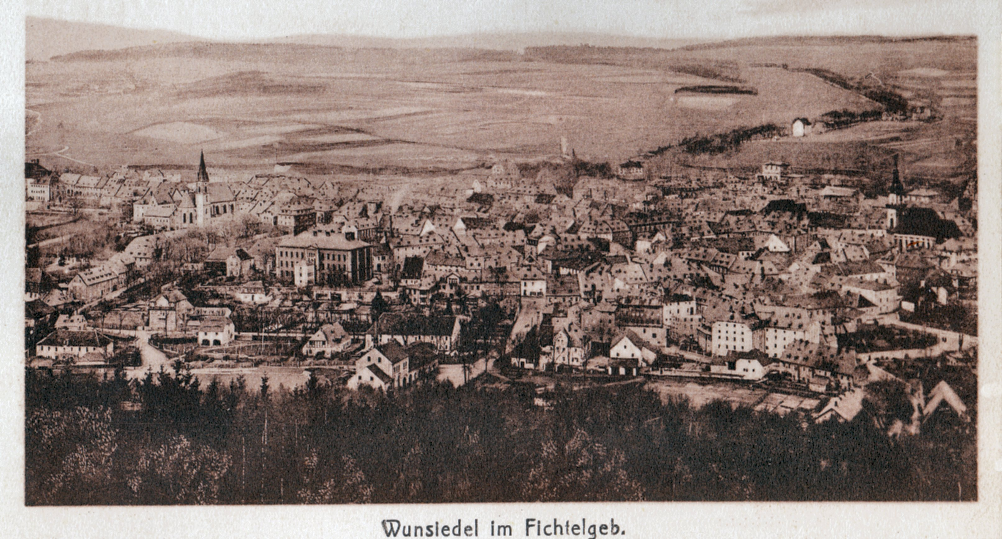 Privat-Ganzsache, K. Unglaub - Wunsiedel 1911 - Vorderseite